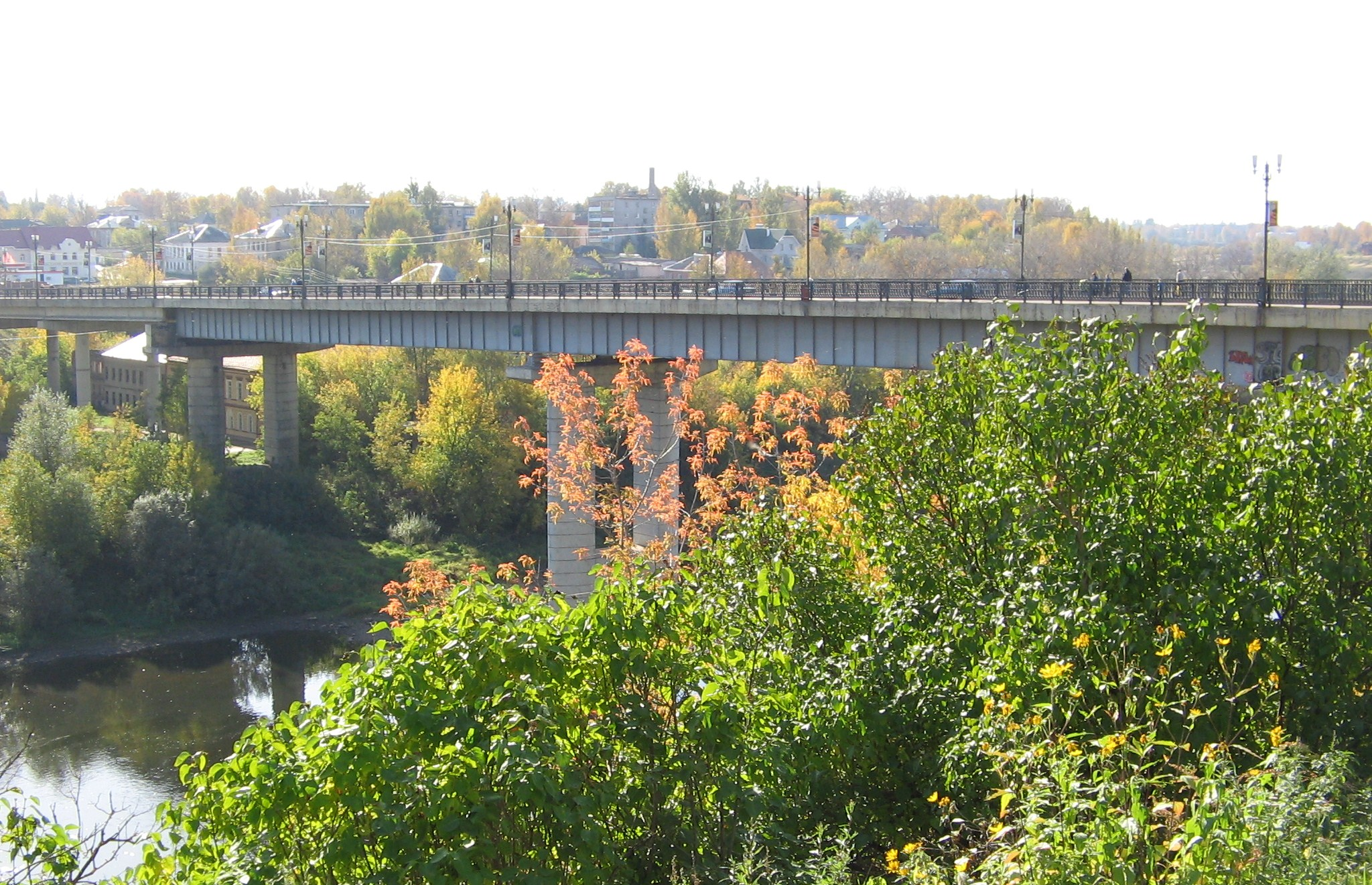 Ржев. Новый мост летом